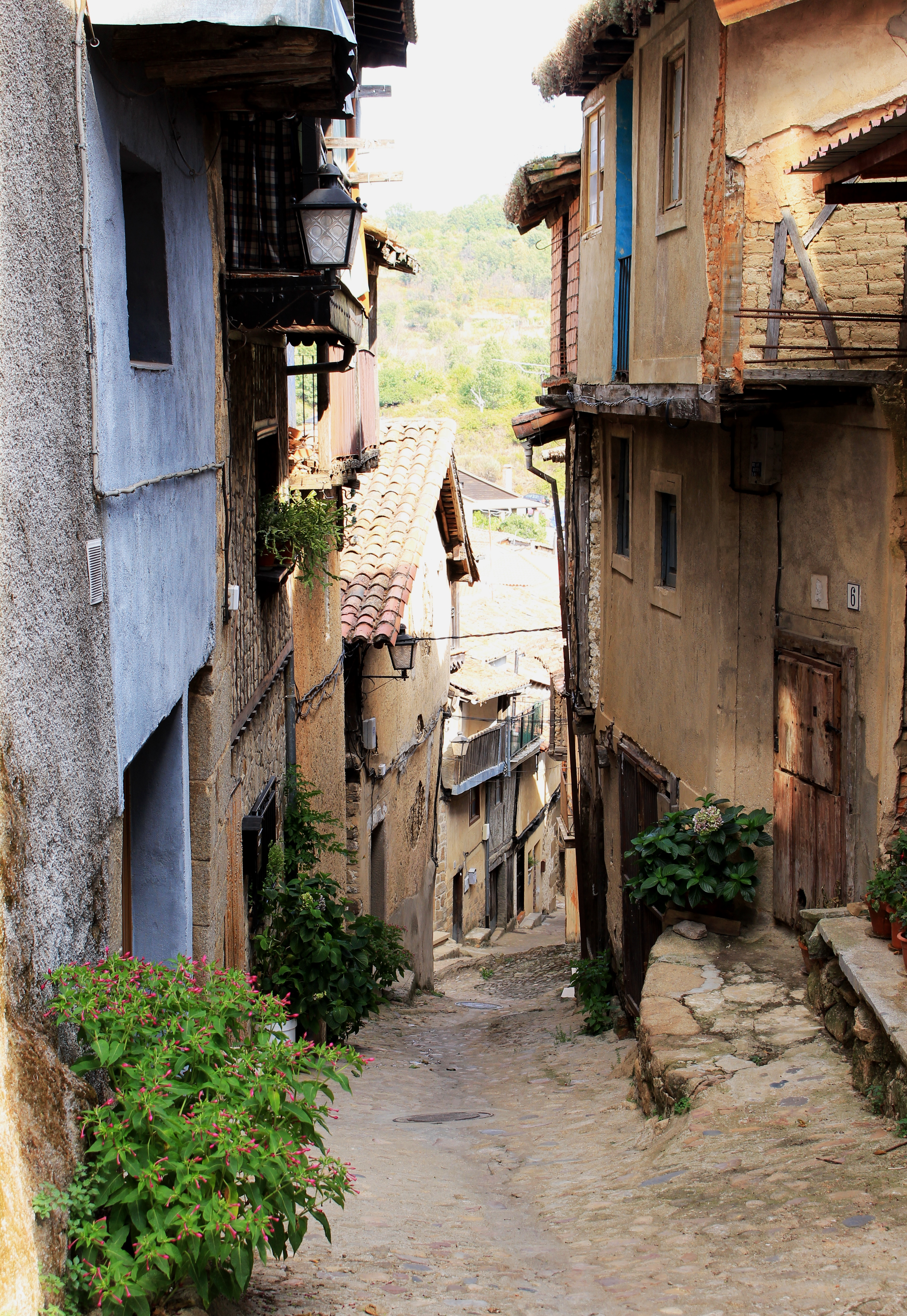 Rue de Cepeda, Salamanca